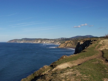 Vista Panorámica de los acantilados de Vizcaya Origen: Imagen Propia